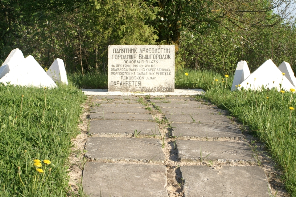 Памятный знак Городища Вышгородок в одноимённой деревне Пыталовского района Псковской области России